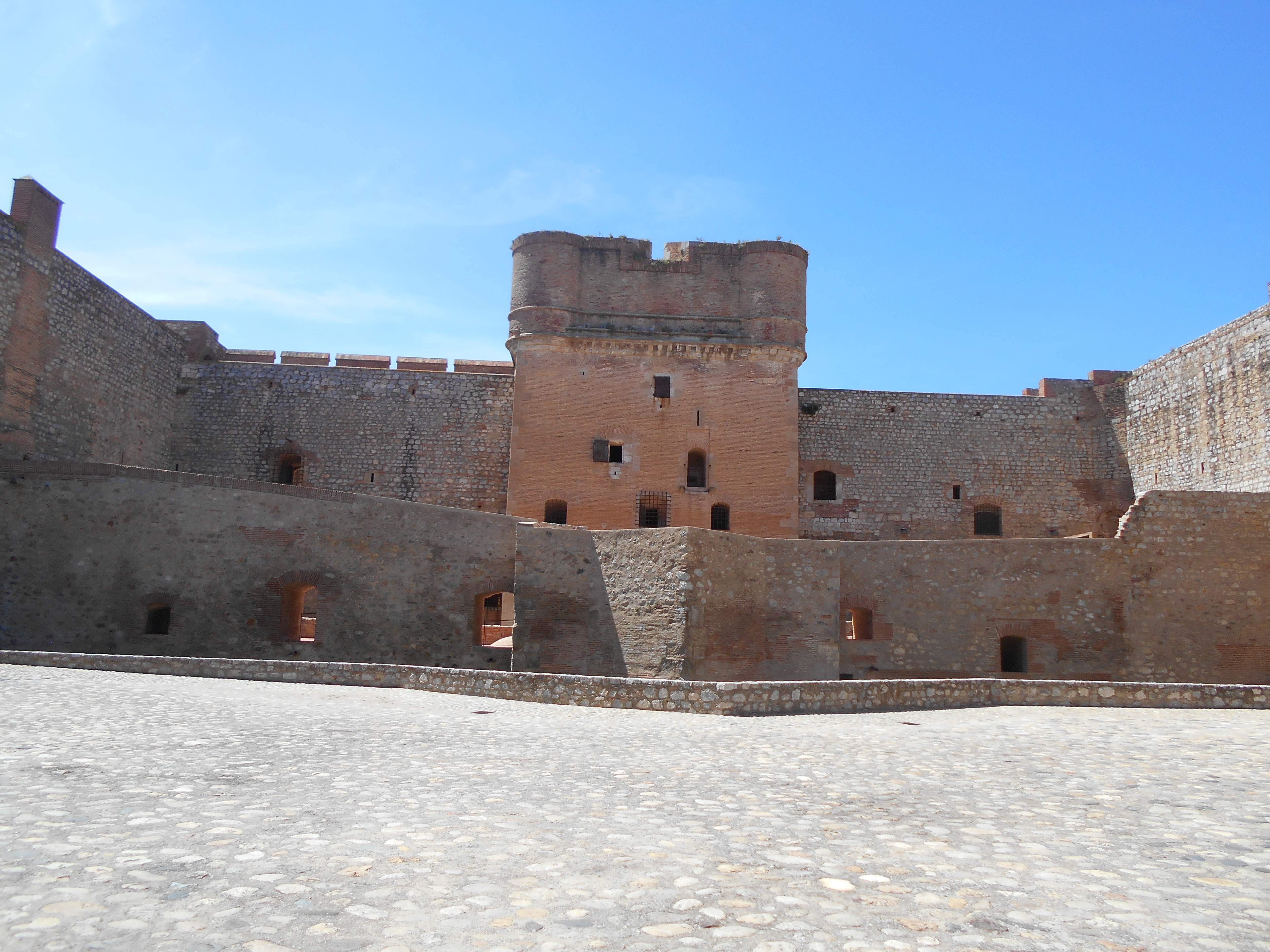 Zona noble del Castell de Salses